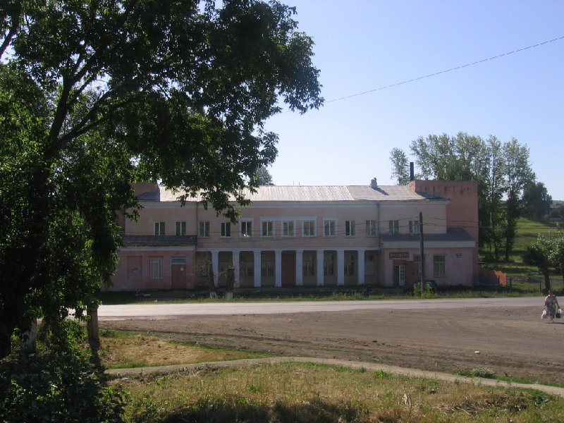 Клуб